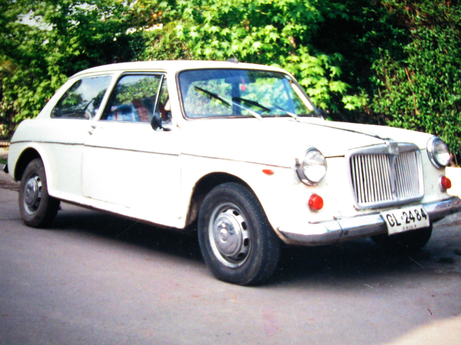 MG 1100